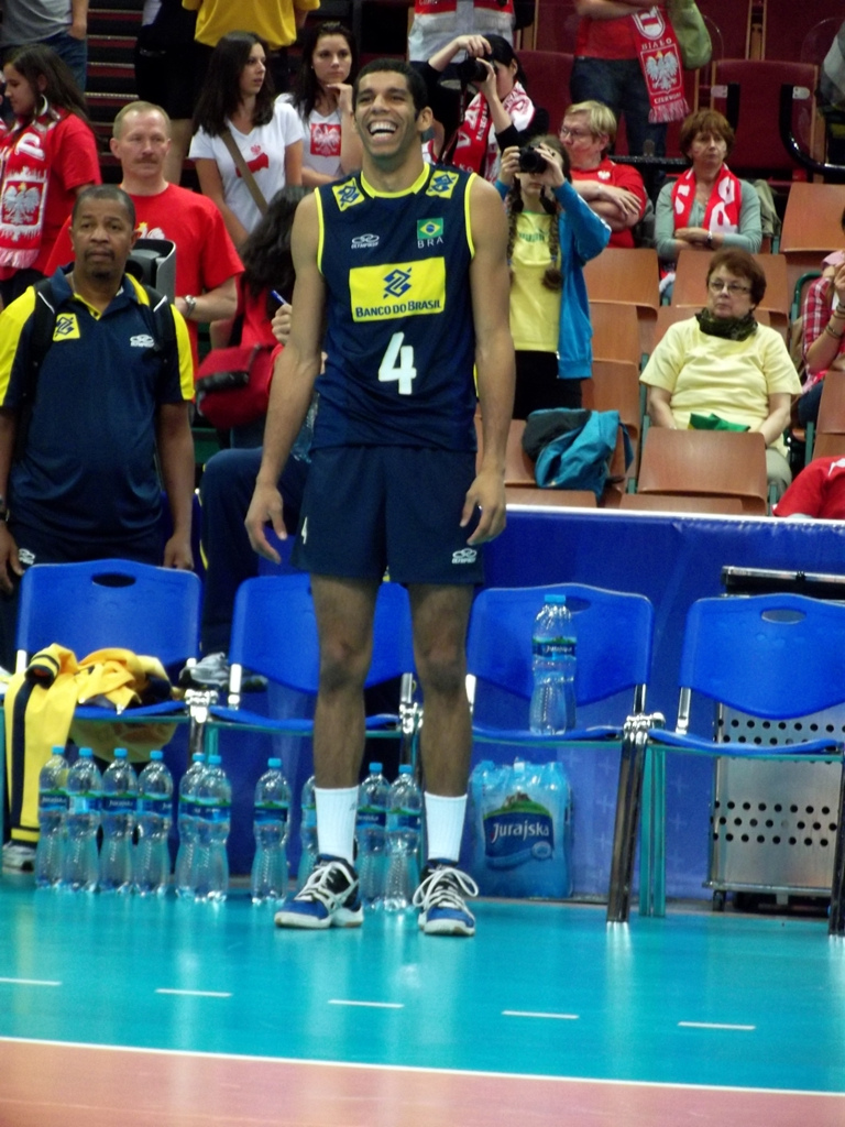 Zdjęcie zrobione podczas zawodów Ligi Światowej 2012 w katowickim Spodku.